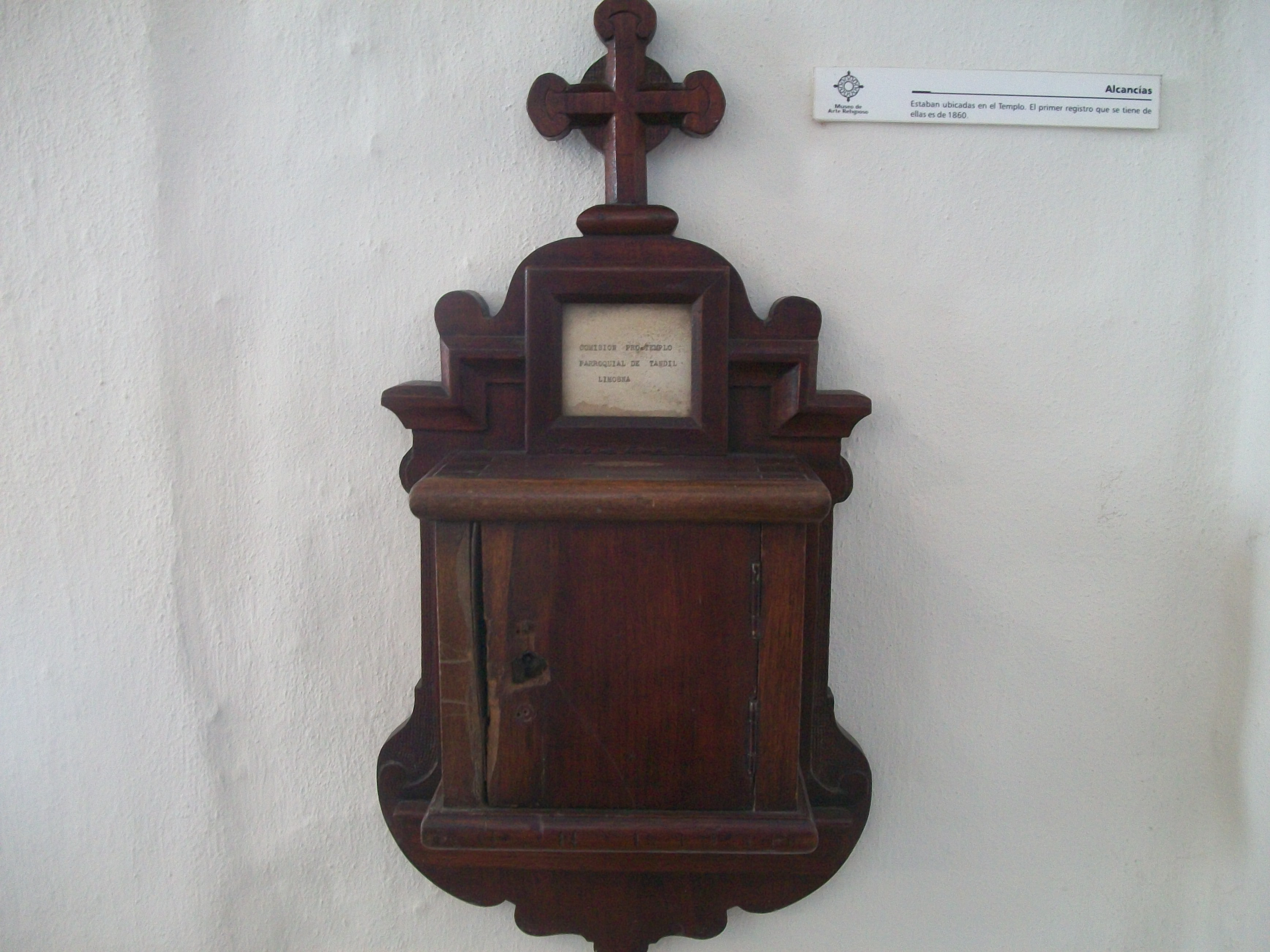 Iglesia de Tandil, Argentina